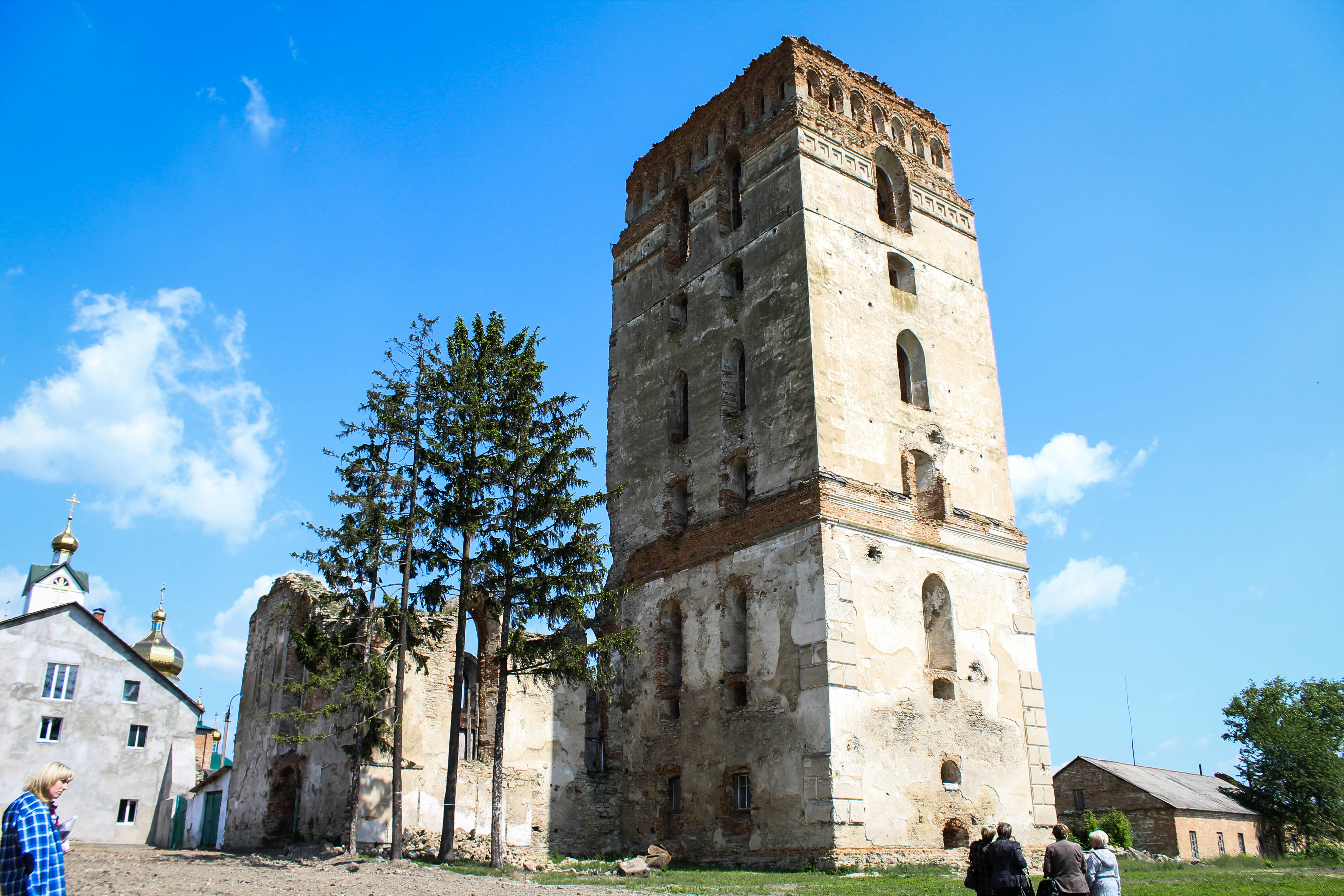 Комплекс споруд оборонної башти, Старокостянтинів, вул. І. Федорова